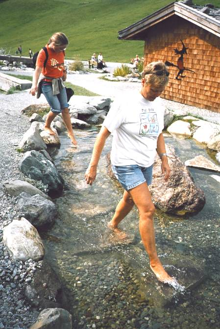 Wasserbecken im Barfußpark Söll/Tirol